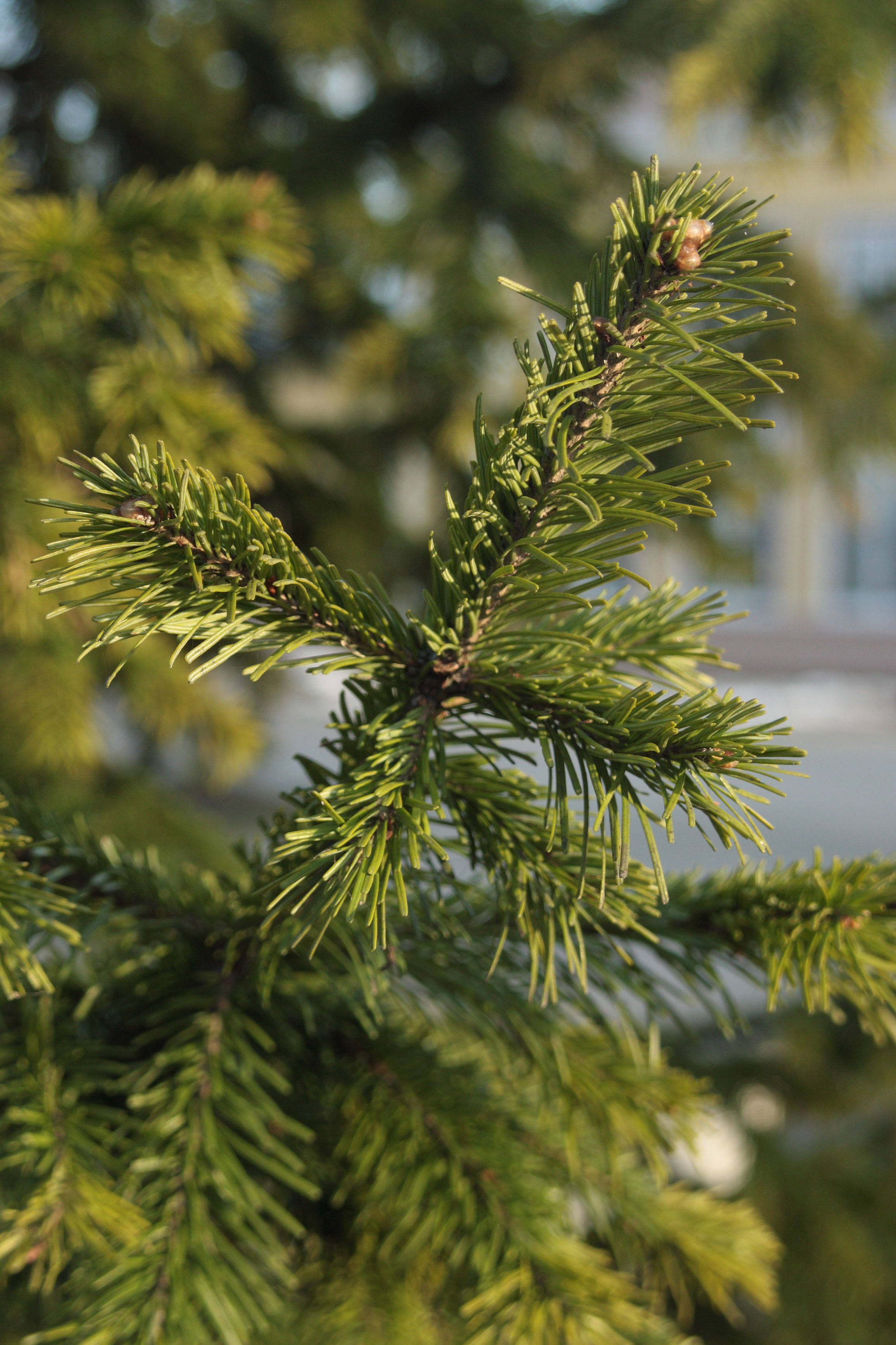 Siberi nulu pungad